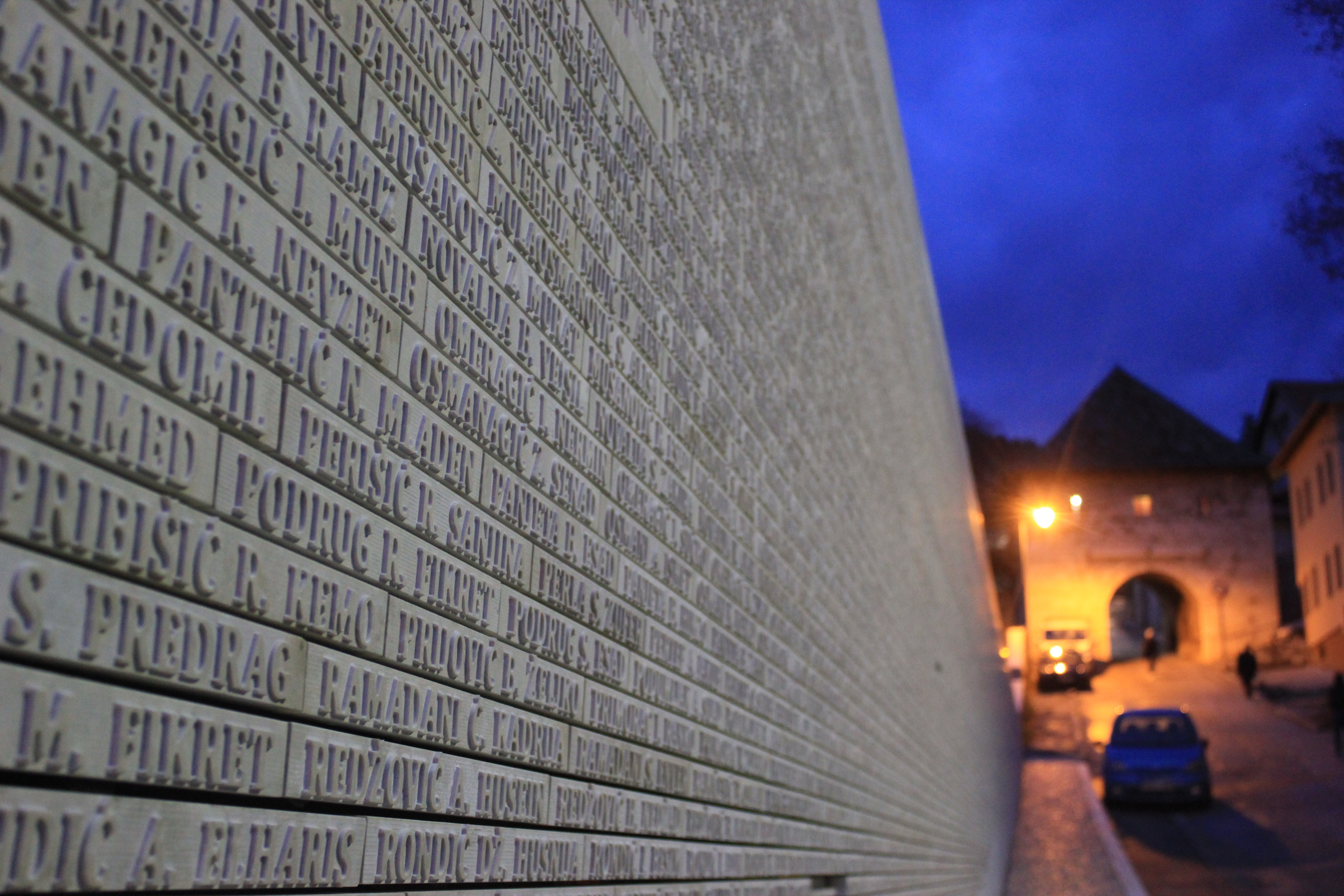 Gedenkstätte für die Opfer der Belagerung von Sarajevo, Širokac, Sarajevo